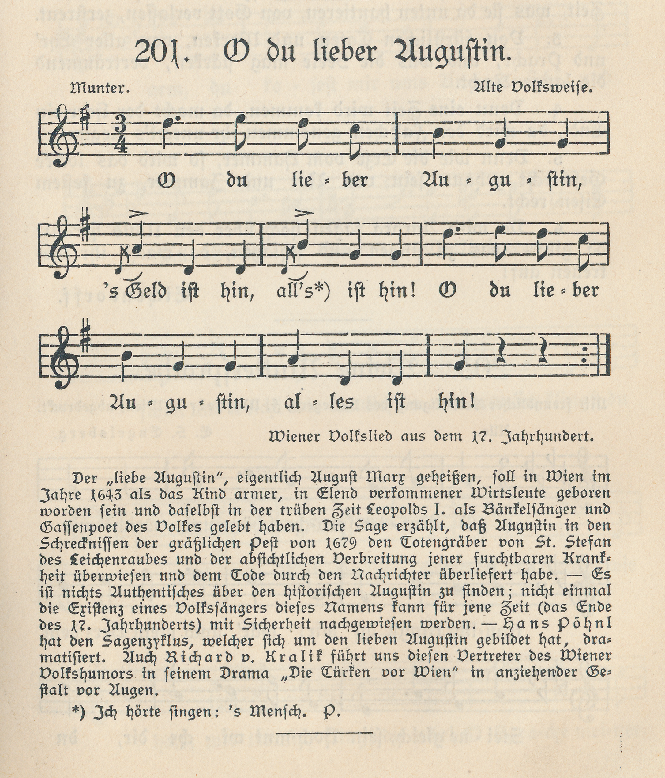 Das Volkslied O du lieber Augustin in Josef Pommers Liederbuch für die Deutschen in Österreich.